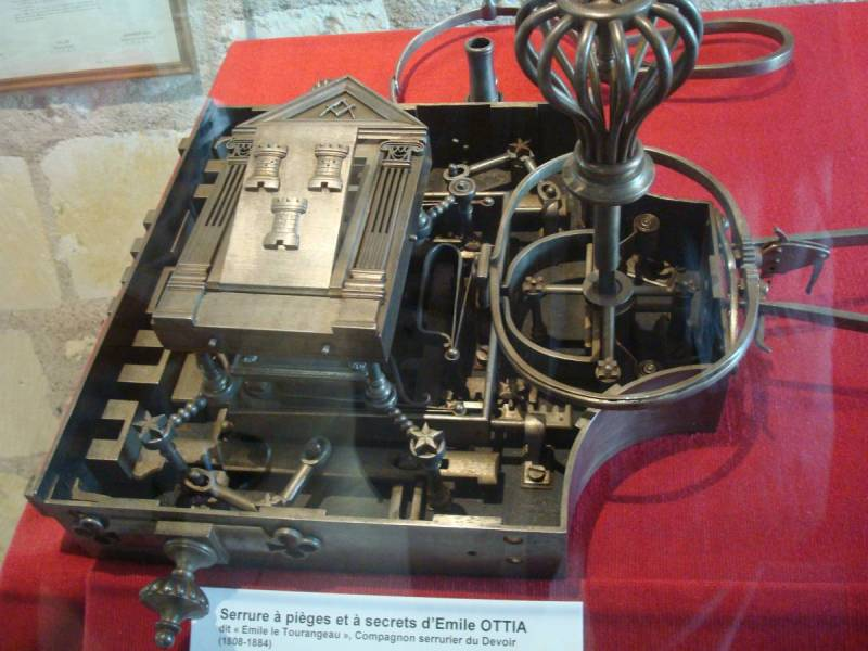 Photo de la serrure à pièges et secrets d'Emile Ottia, dit "Emile le Tourangeau", Compagnon Serrurier du Devoir (1808-1884), musée du Compagnonnage de Tours.